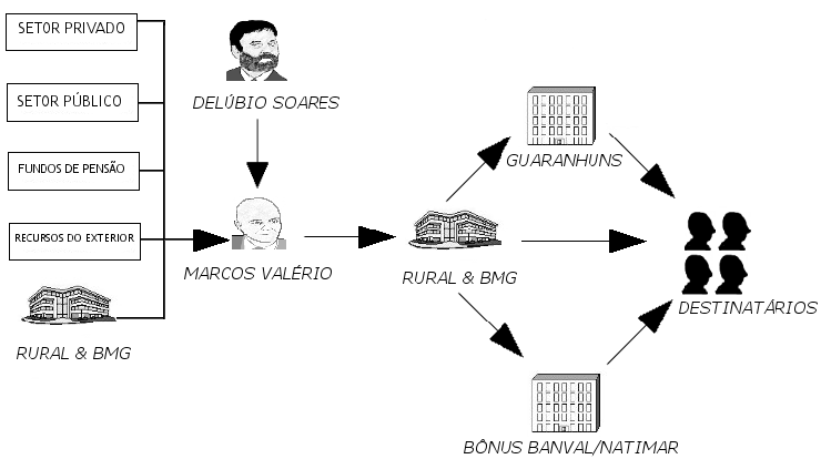 O Diagrama do Valerioduto.